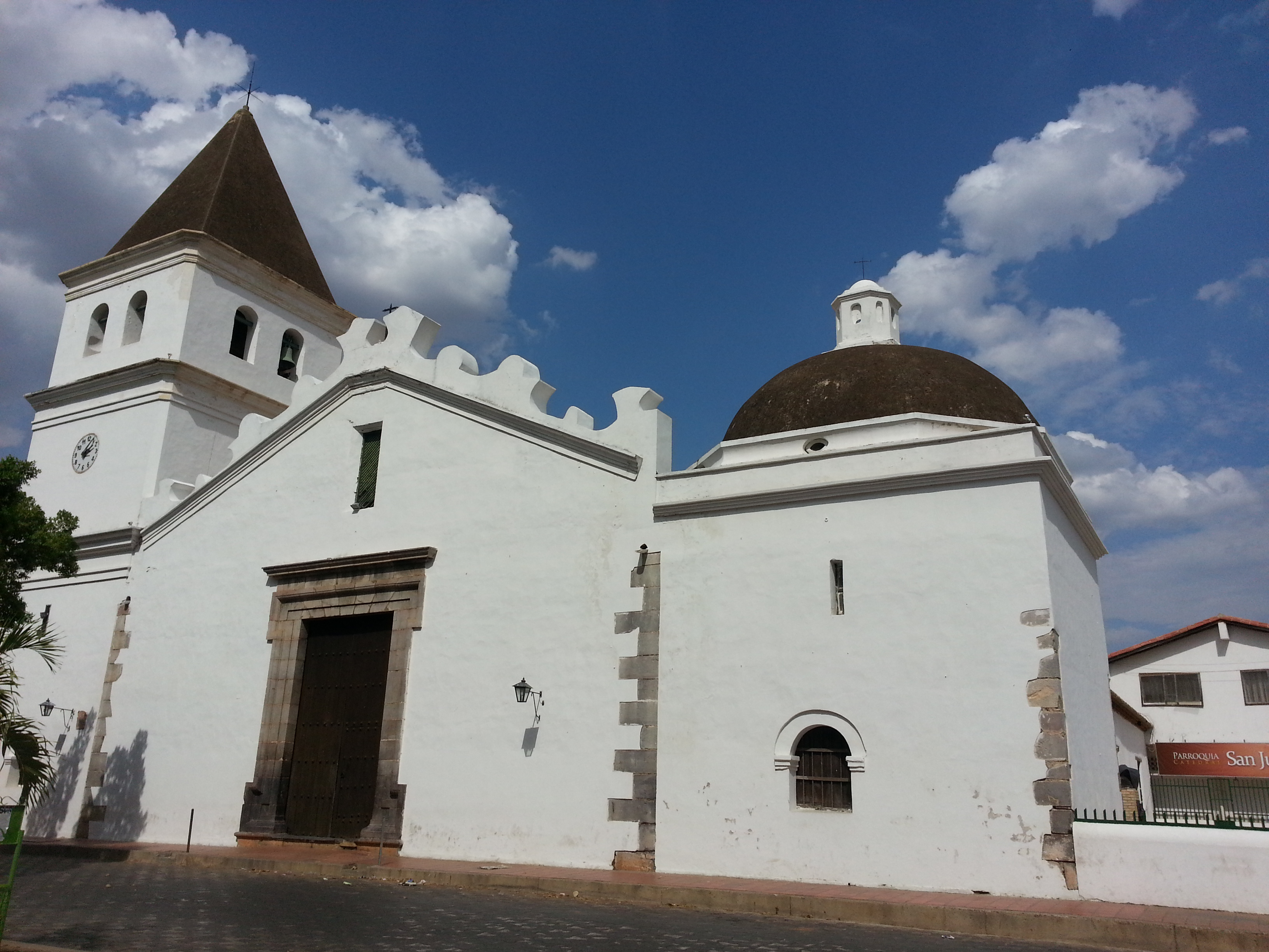 IGLESIA SAN JUAN BAUTISTA, CARORA EDO. LARA